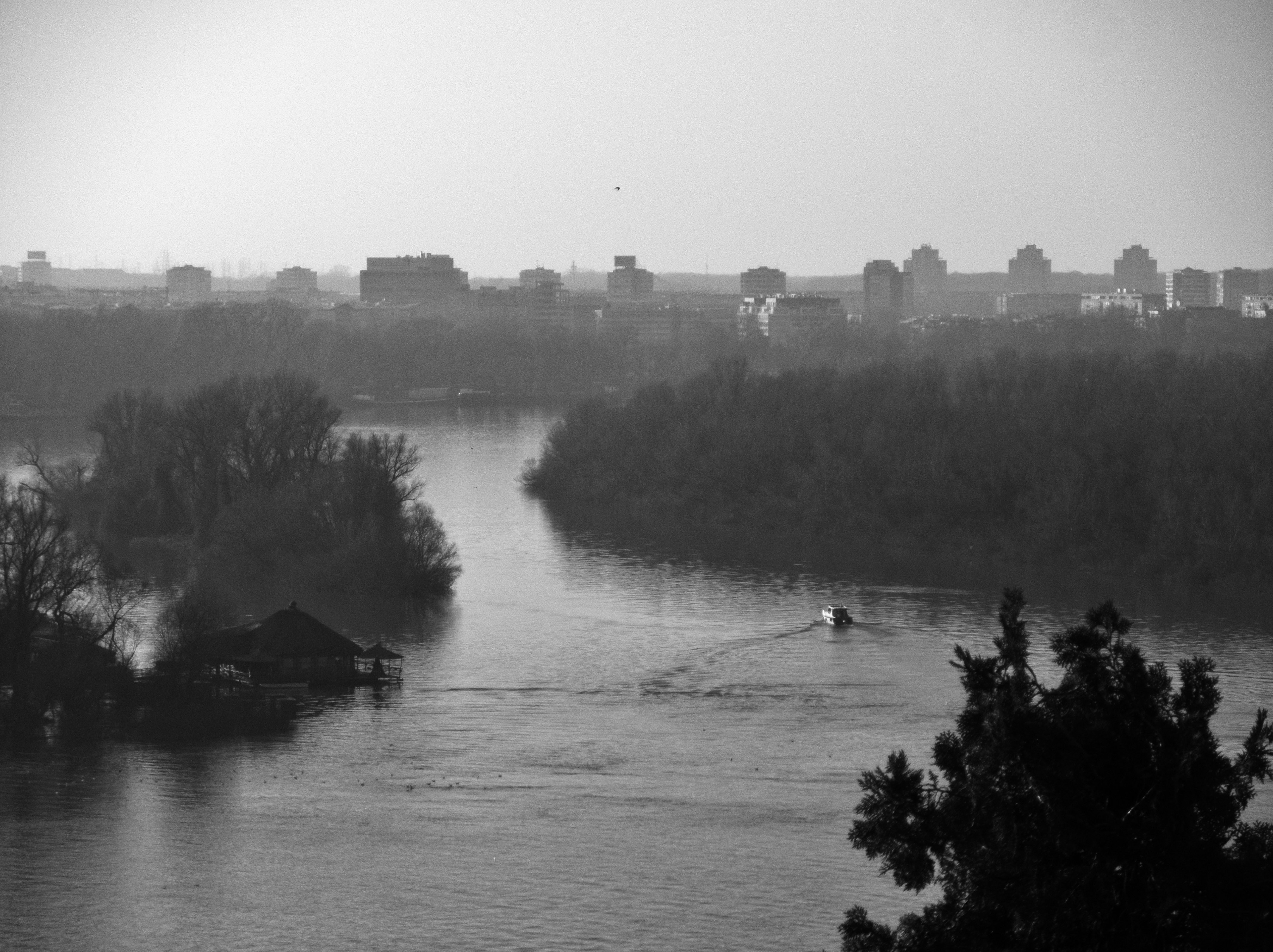 Српски (ћирилица): Ово је фотографија заштићеног природног добра у Србији под шифром: ПИО02 This is a a photo of a natural area in Serbia with ID: ПИО02